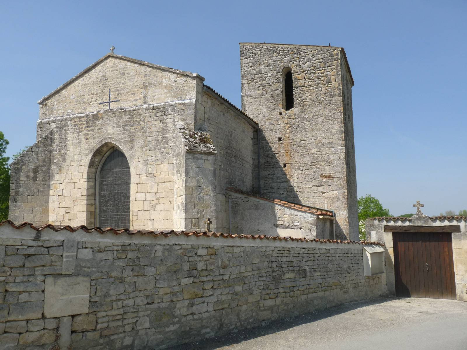 Eglise de Bréville, Charente, France